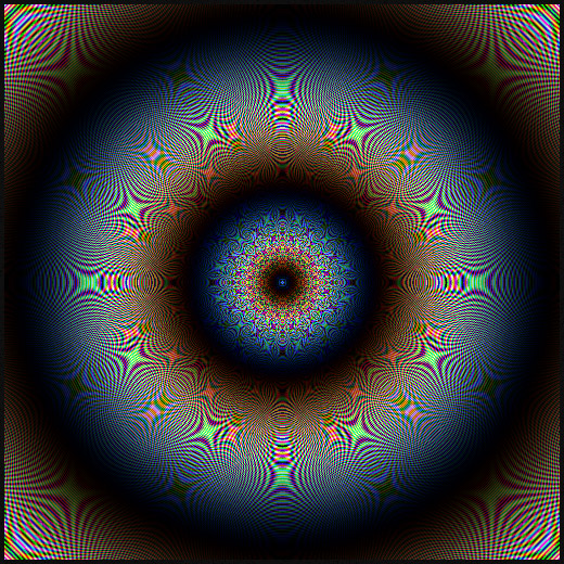 Z-plasma, en typ av "plasma", se plasma (interferensmönster). Kategori:Datorgrafik